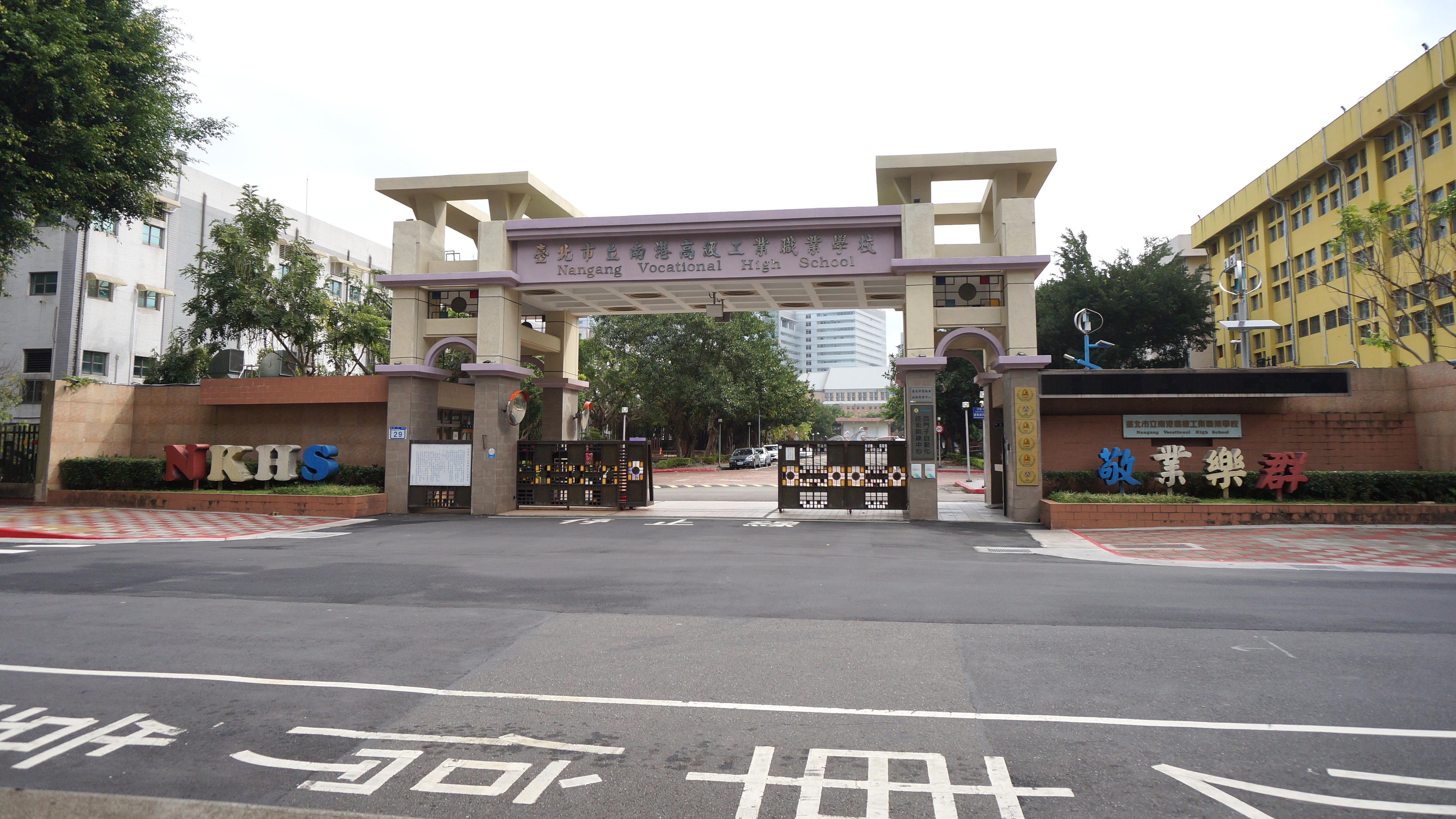 臺北市立南港高級工業職業學校大門。